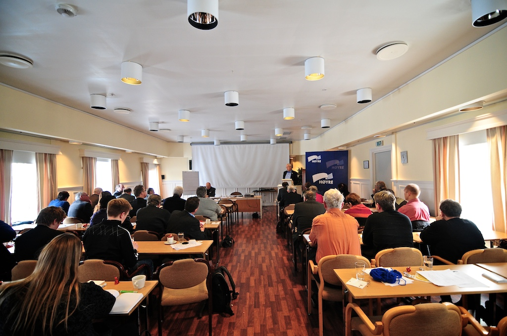 Norsk (bokmål): Fra Nord-Trøndelag Høyres årsmøte på Jægtvolden i 2009. Lars Myraune på talerstolen.